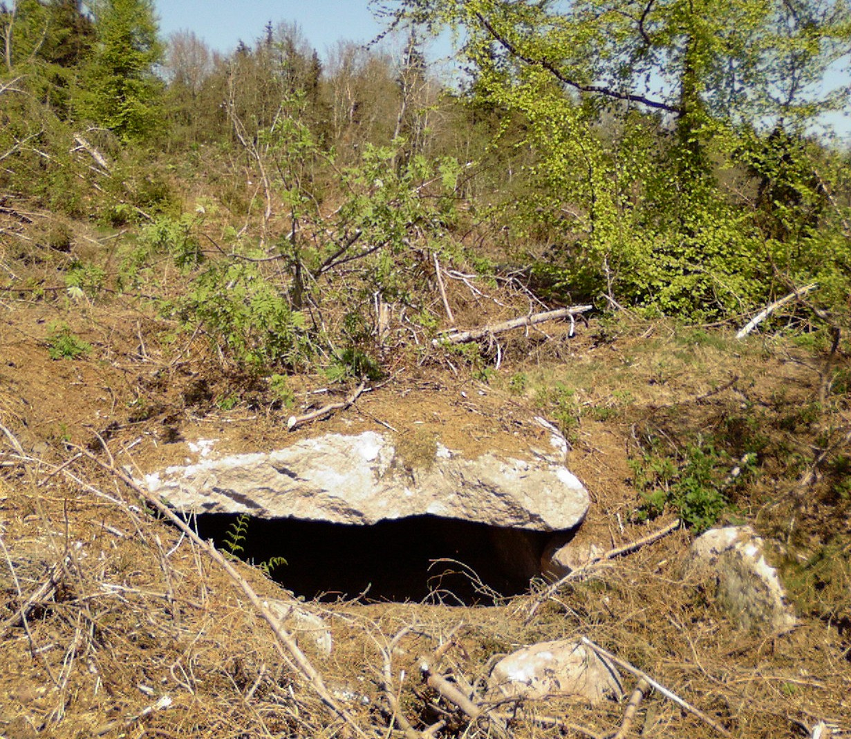 Hellekiste i den vestlige dele af Lundby Bakker.